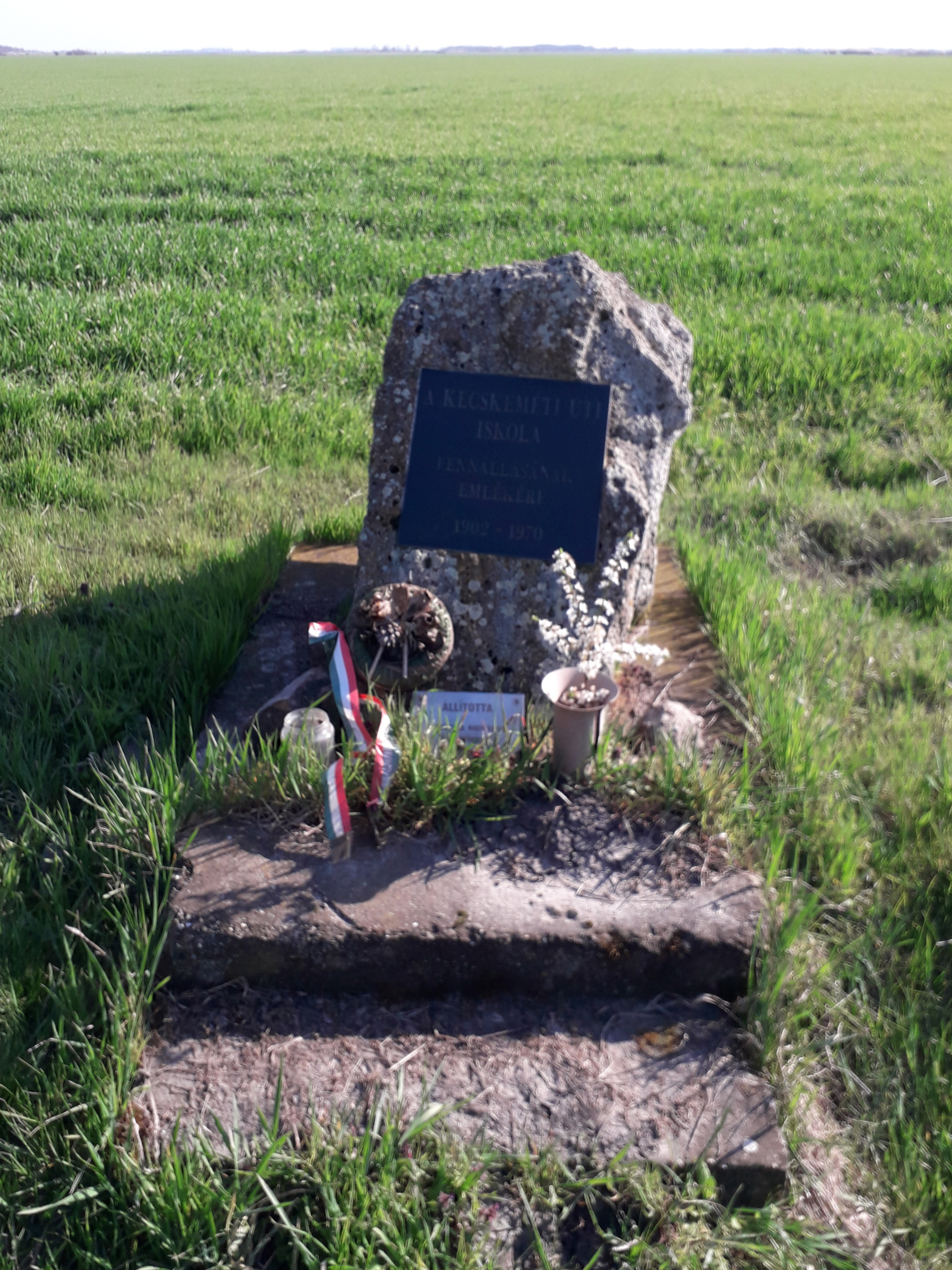 Kecskeméti Úti Iskola emlékműve